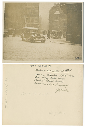 Vana turg, Tallinn